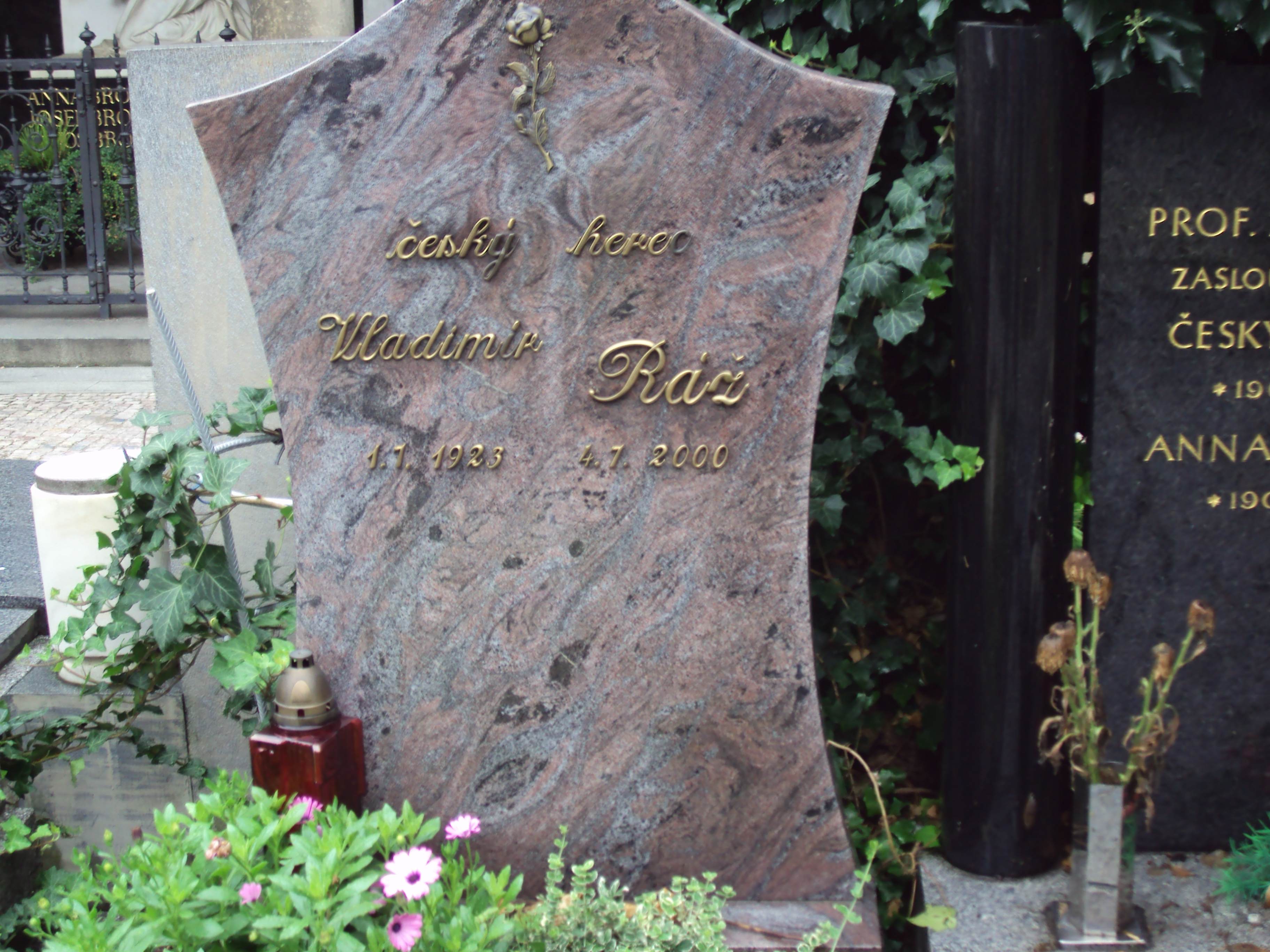 Hrob herce na Vyšehradském hřbitově